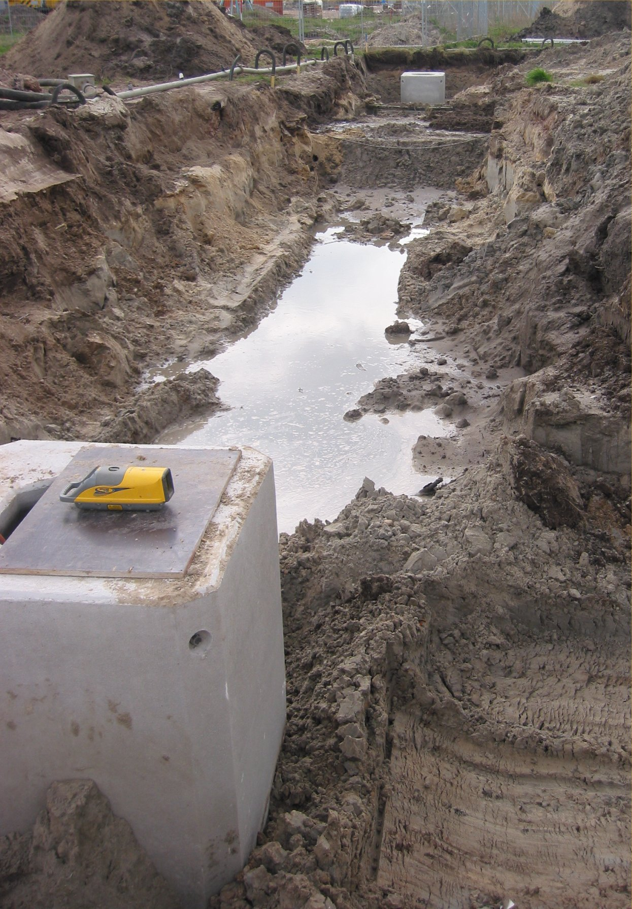 Sleuf voor aanleg riool (Sewer construction